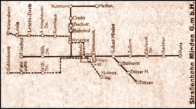 Linien-Netzplan der Straßenbahn Minden GmbH (ca. Mitte 1950er Jahre)